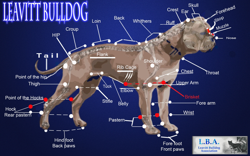 Leavitt bulldog body Diagram